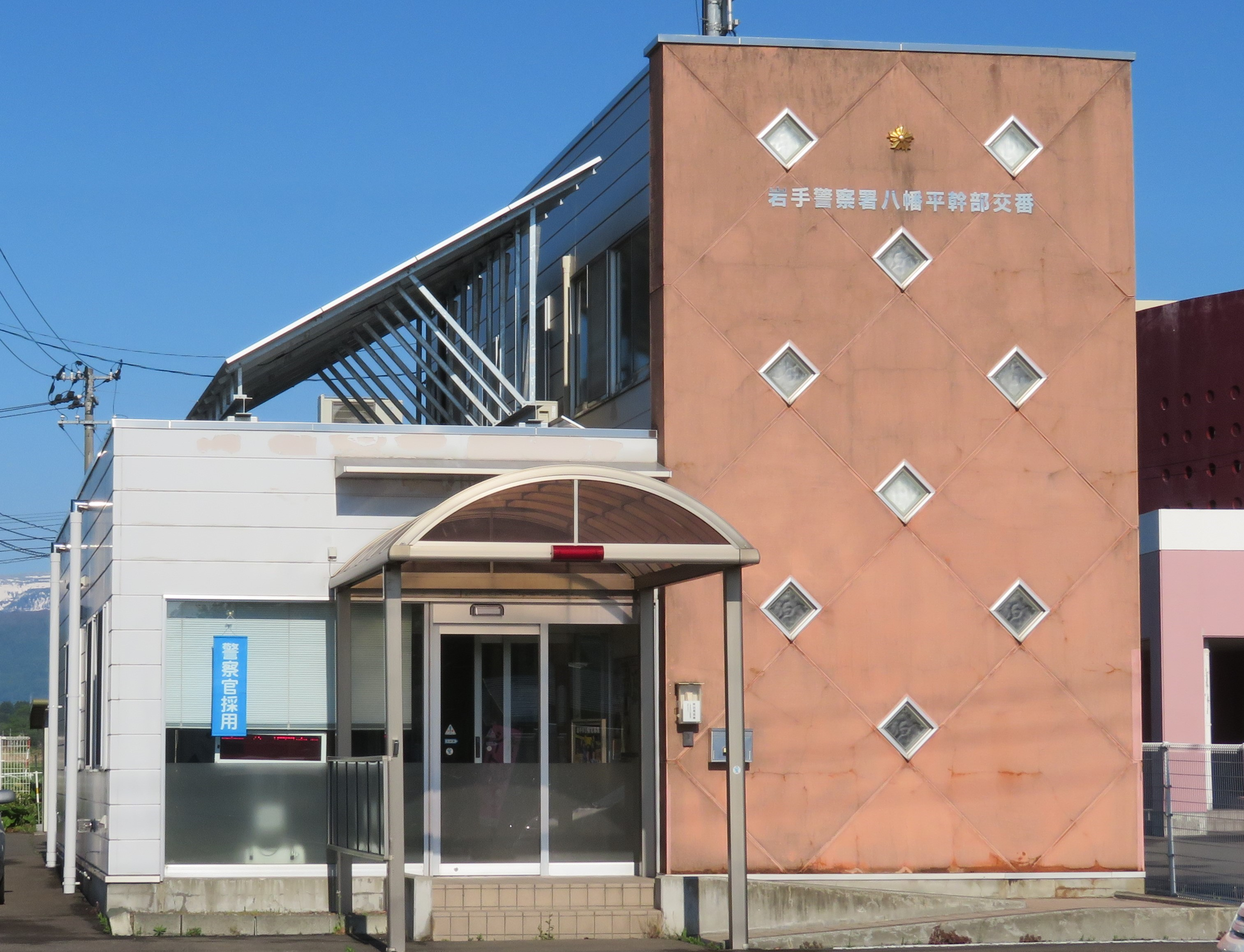 岩手警察署八幡平幹部交番 Canon PowerShot SX720 HS